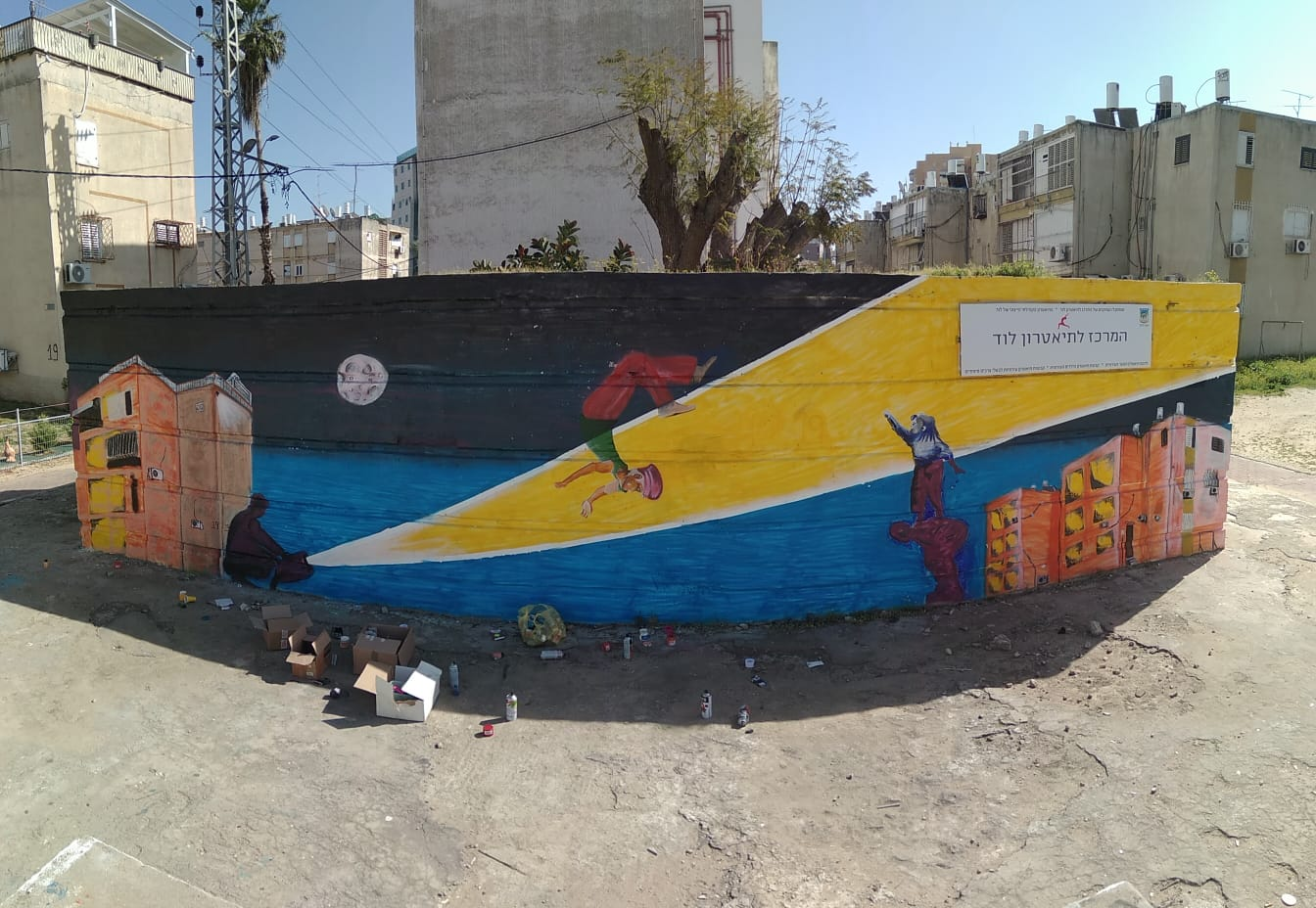 המרכז לתיאטרון לוד